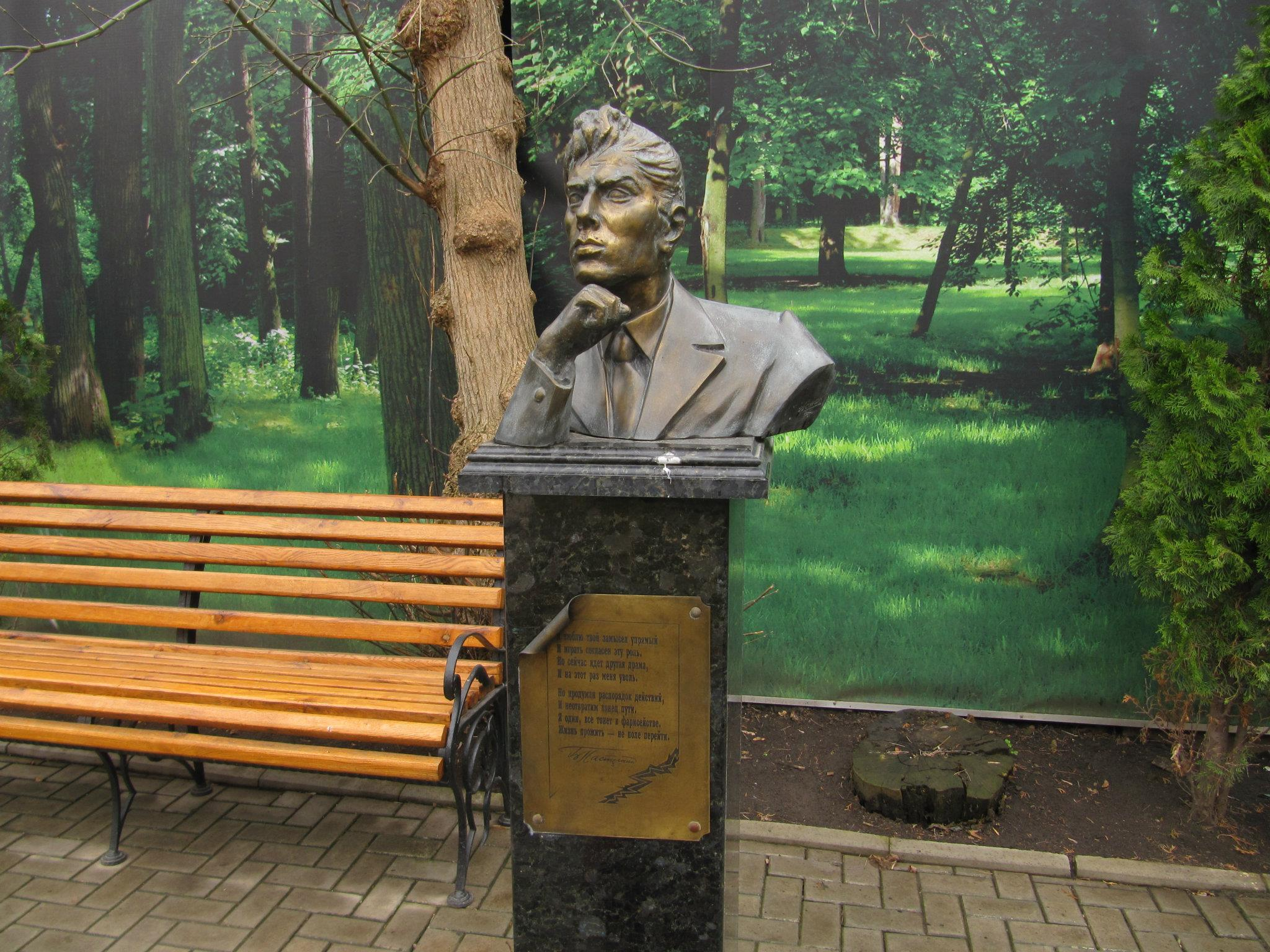 Харьков, ул. Ольминского, 18